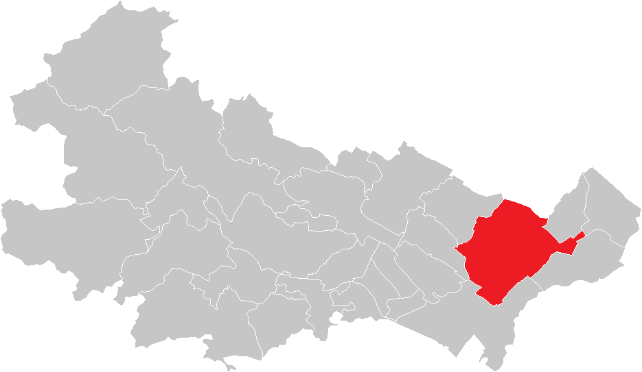 Bezirk Baden